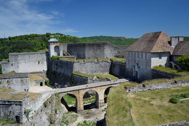 Vue d'ensemble du Front Royal Citadelle de Besançon